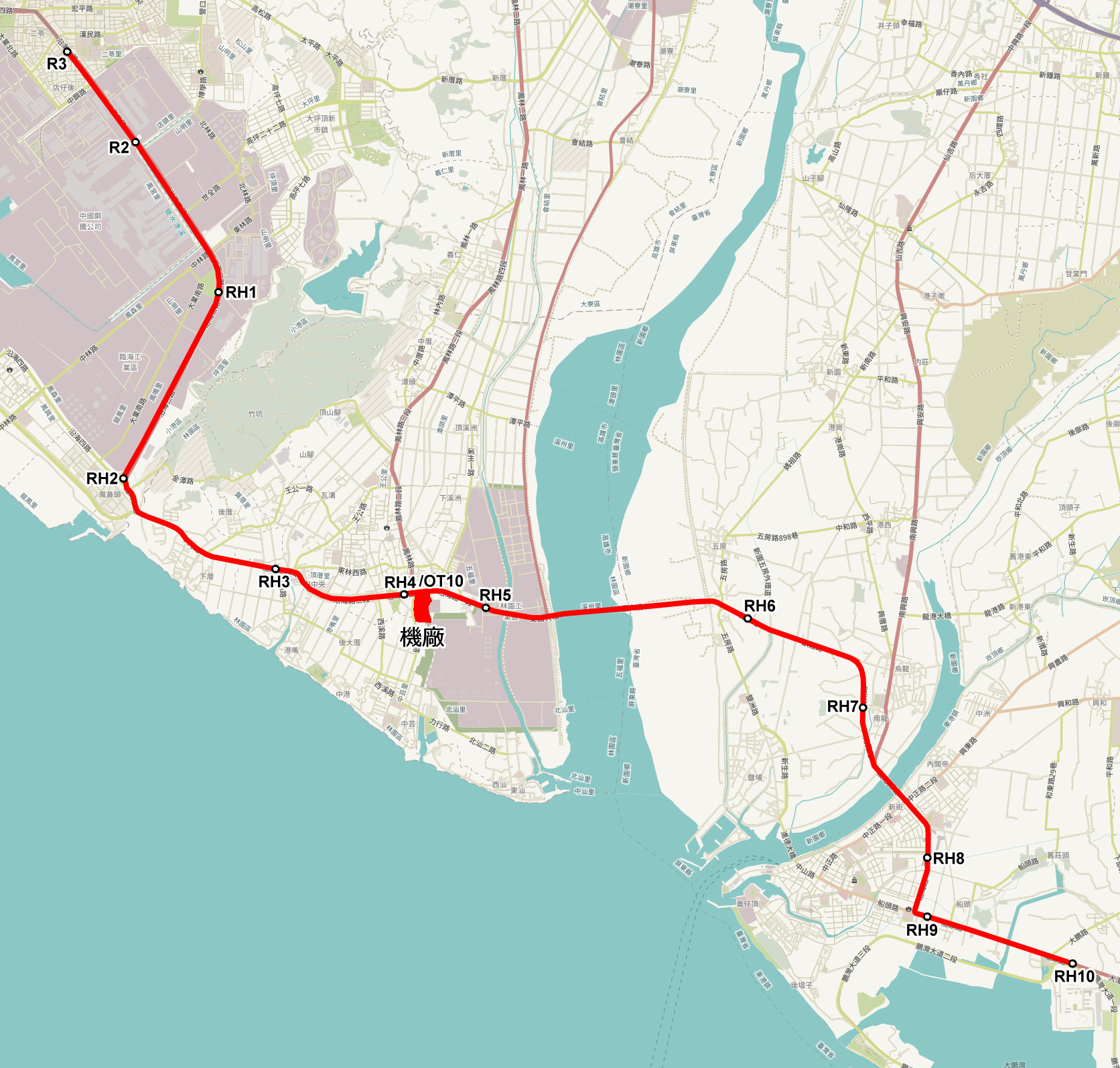 2005年計劃版本的高雄捷運輕軌林園延伸線